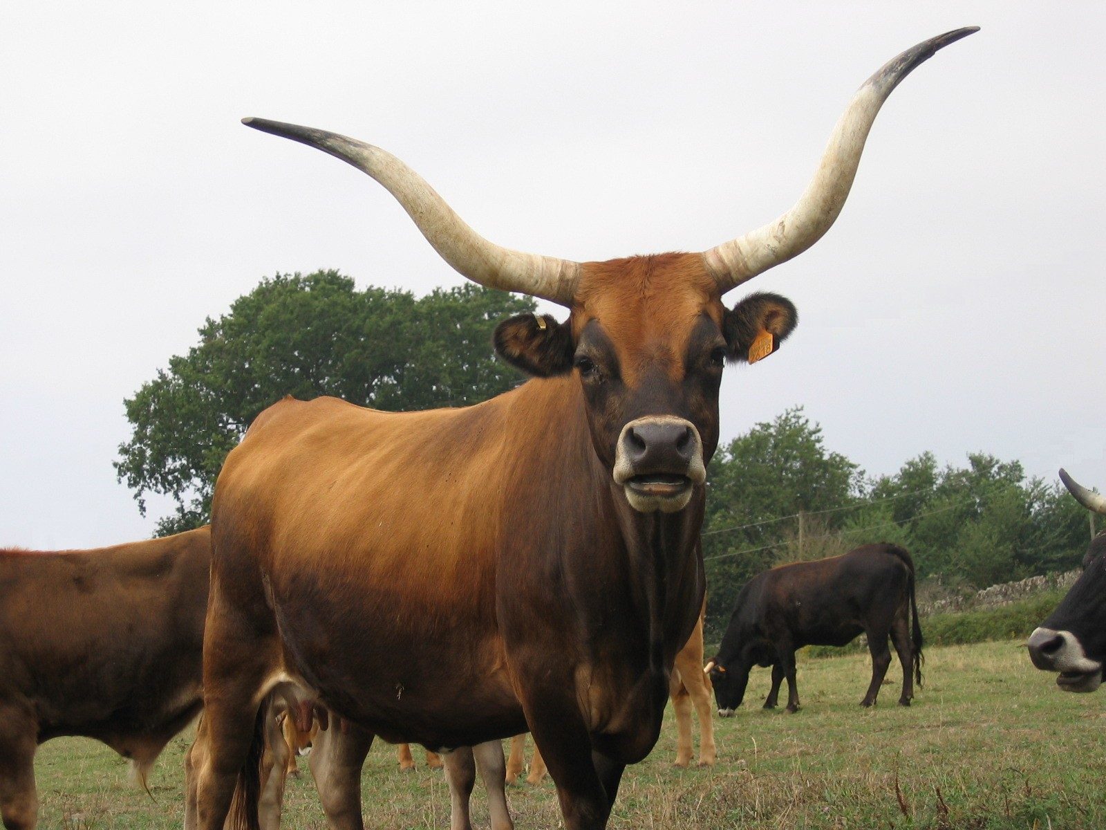 Vaca de raza cachena (Centro de recuperación de razas autóctonas, Coles, Ourense).